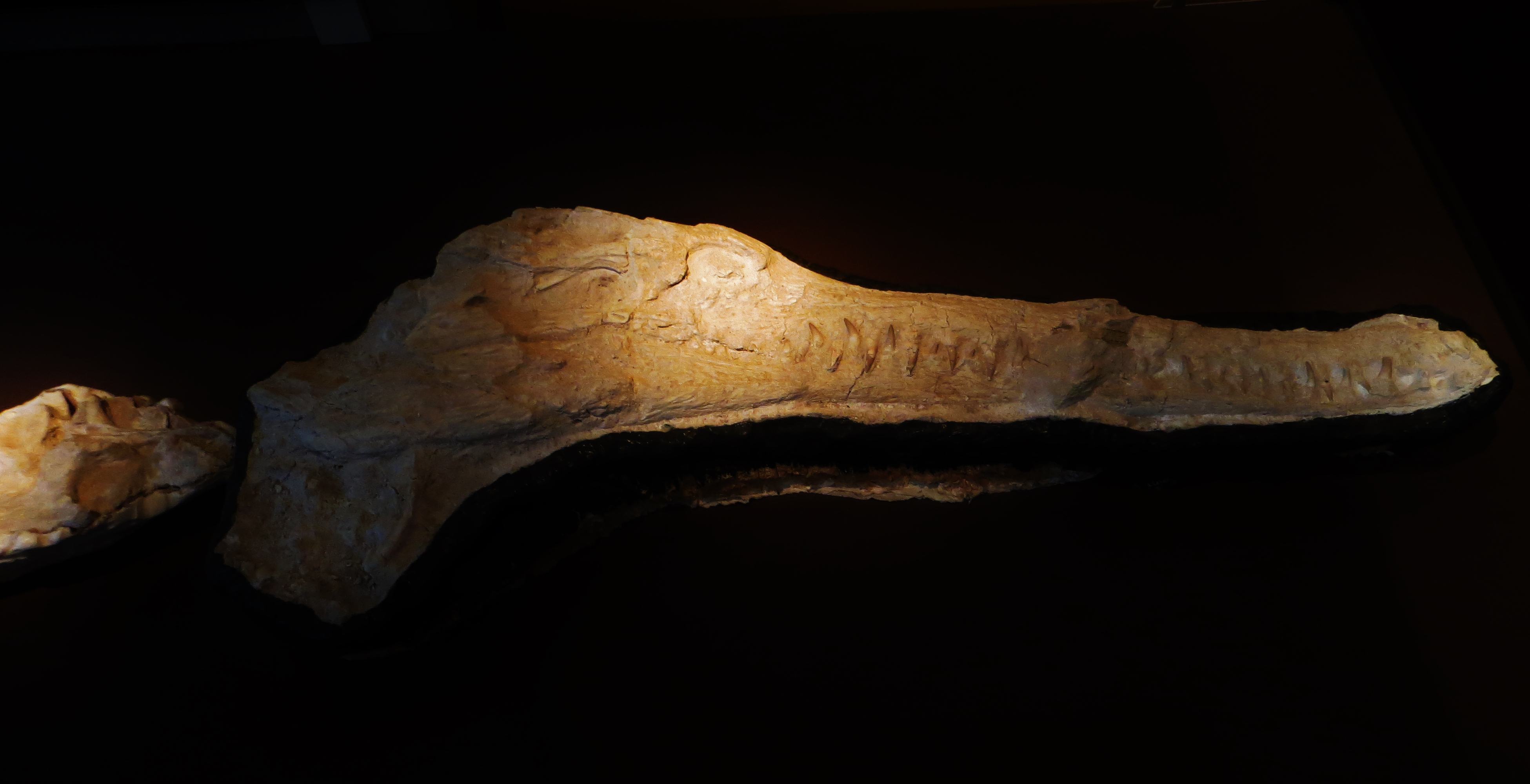 Fossil of Dyrosaurus - Took the picture at Museon, Den Haag